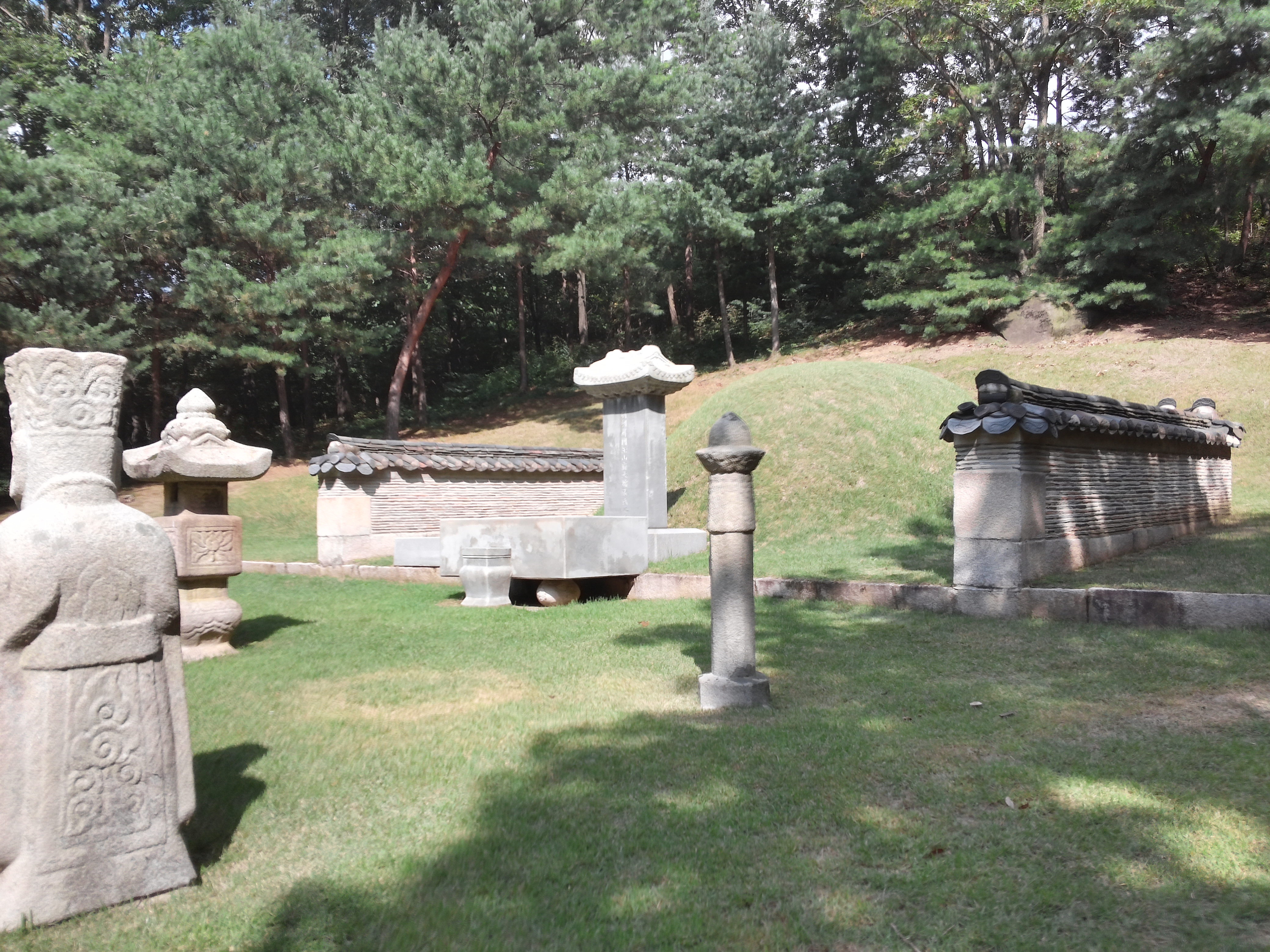 서오릉 내에 위치한 희빈 장씨의 무덤(대빈묘)